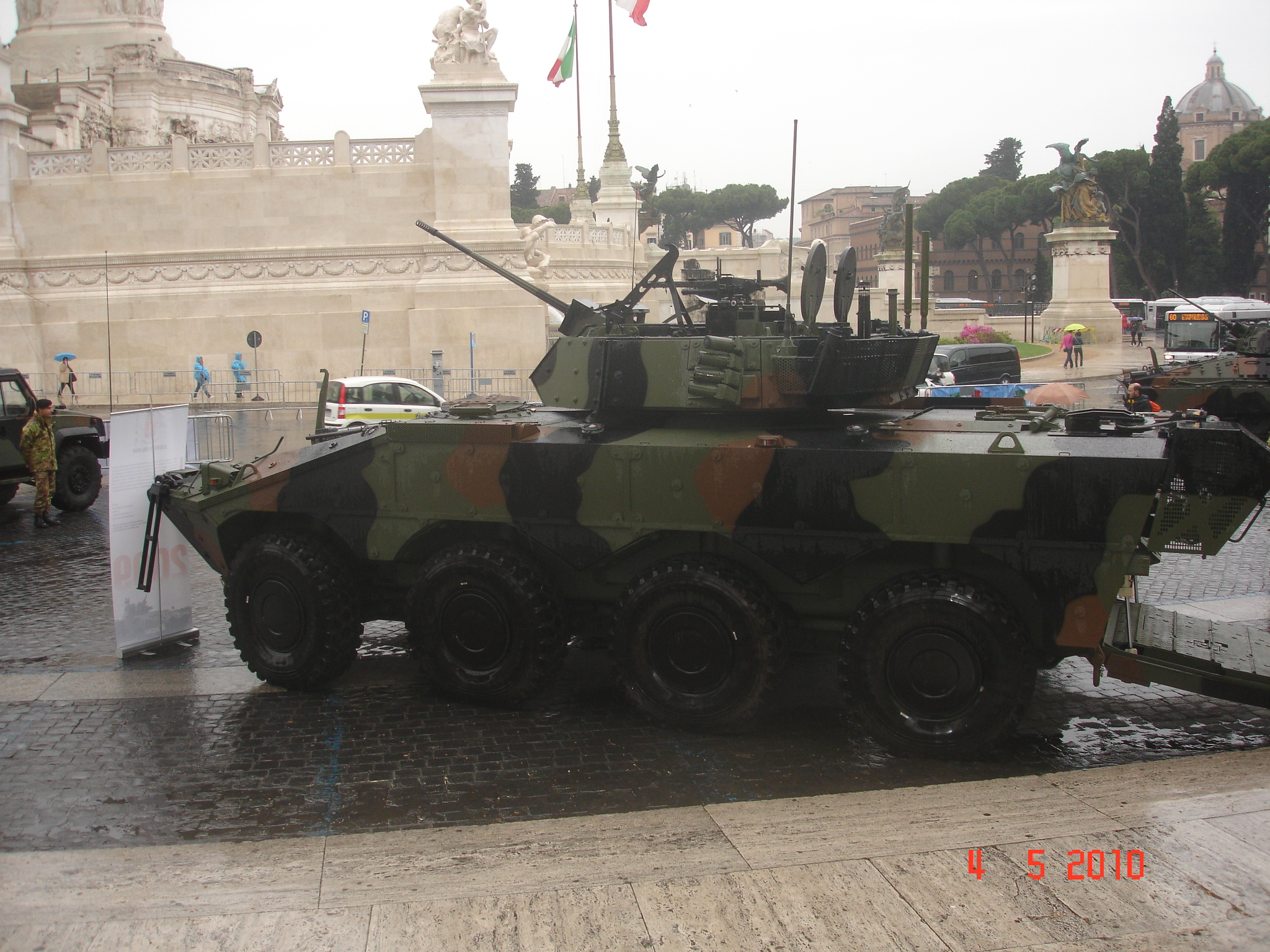 VBM Freccia fotografato a Roma di fronte l'altare della patria.